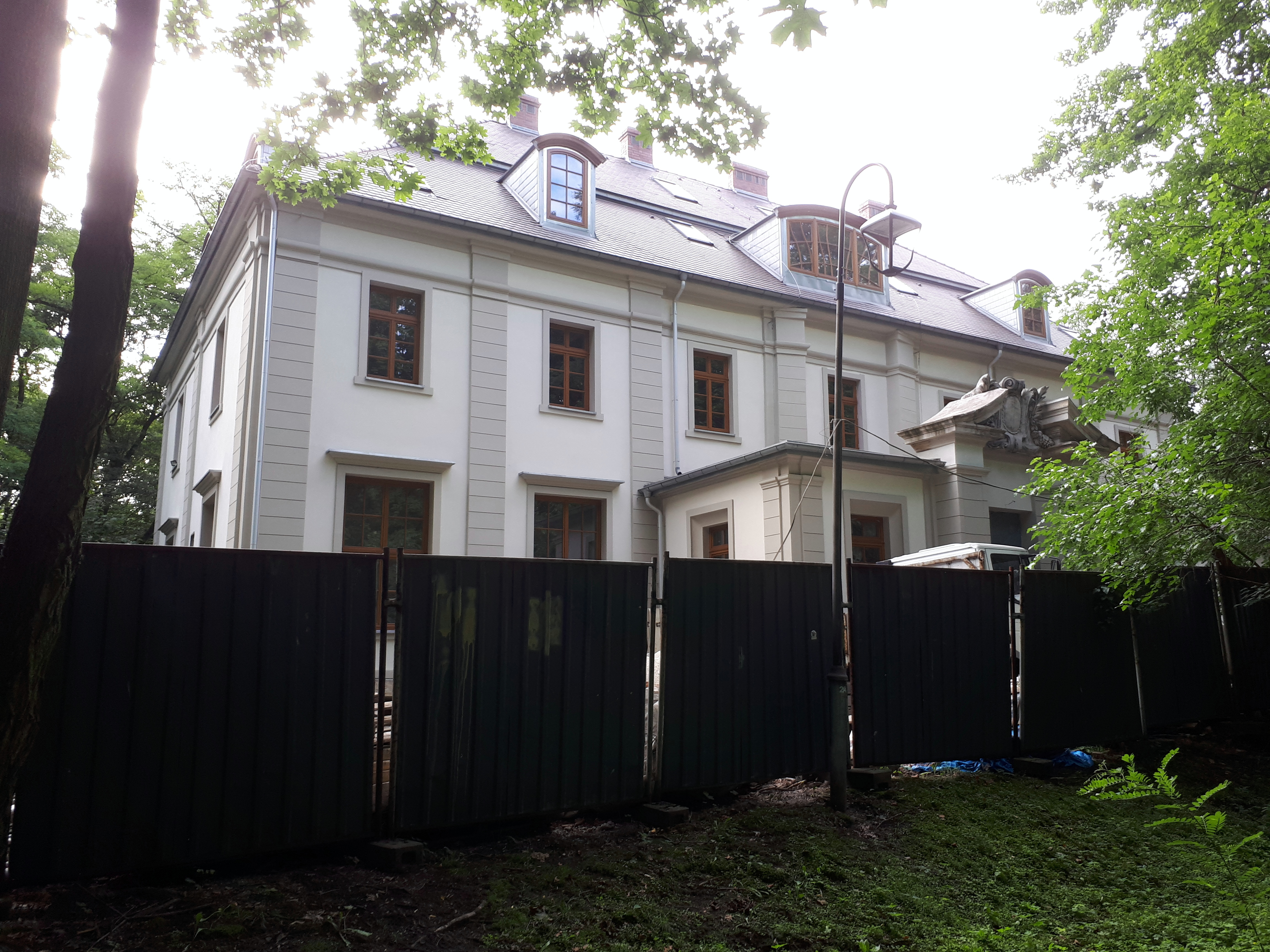 Pałac Wilhelma w Sosnowcu Środuli podczas remontu.